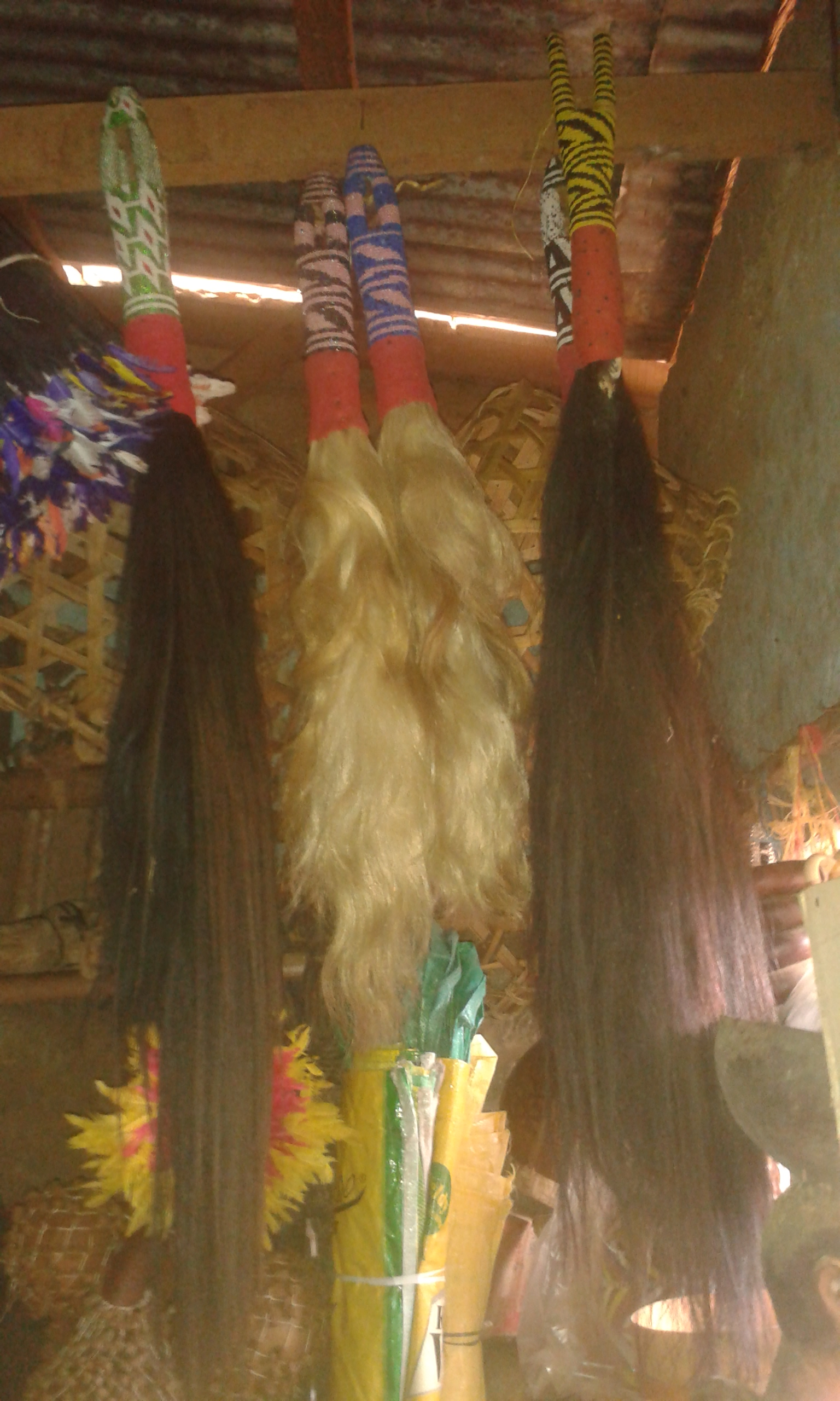 queue de chevale utilisé dans la reégion de l'ouest Cameroun pendant les cérémonies de funéraille pour effectuer des danses traditionelles This is an image of Cultural Fashion or Adornment from Cameroon